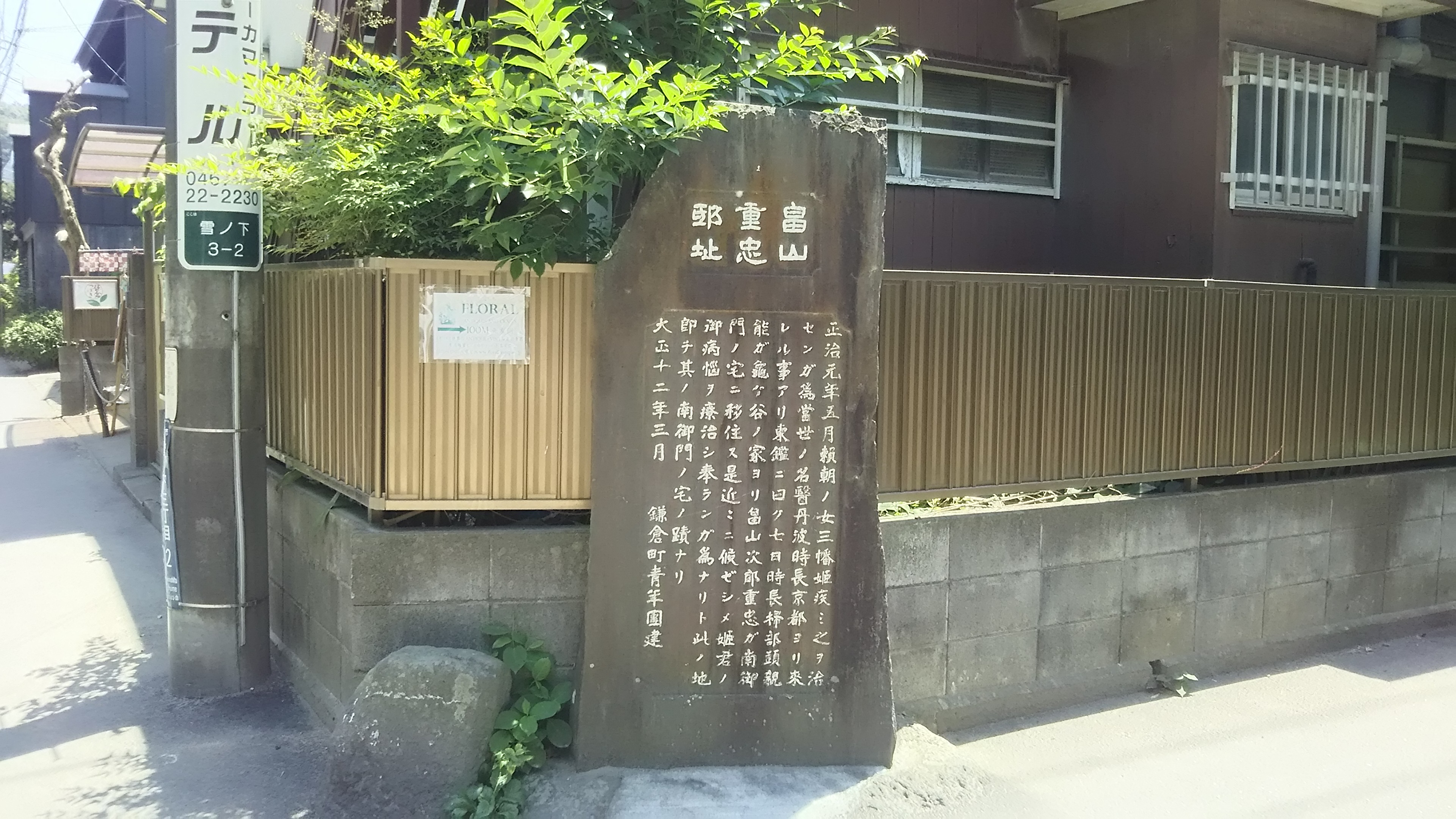 雪ノ下3-2-19付近。三幡治療の為、丹波時長が中原親能家からここ畠山重忠邸へ移動